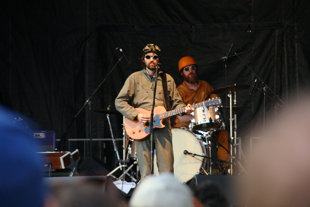 Bild hämtad från